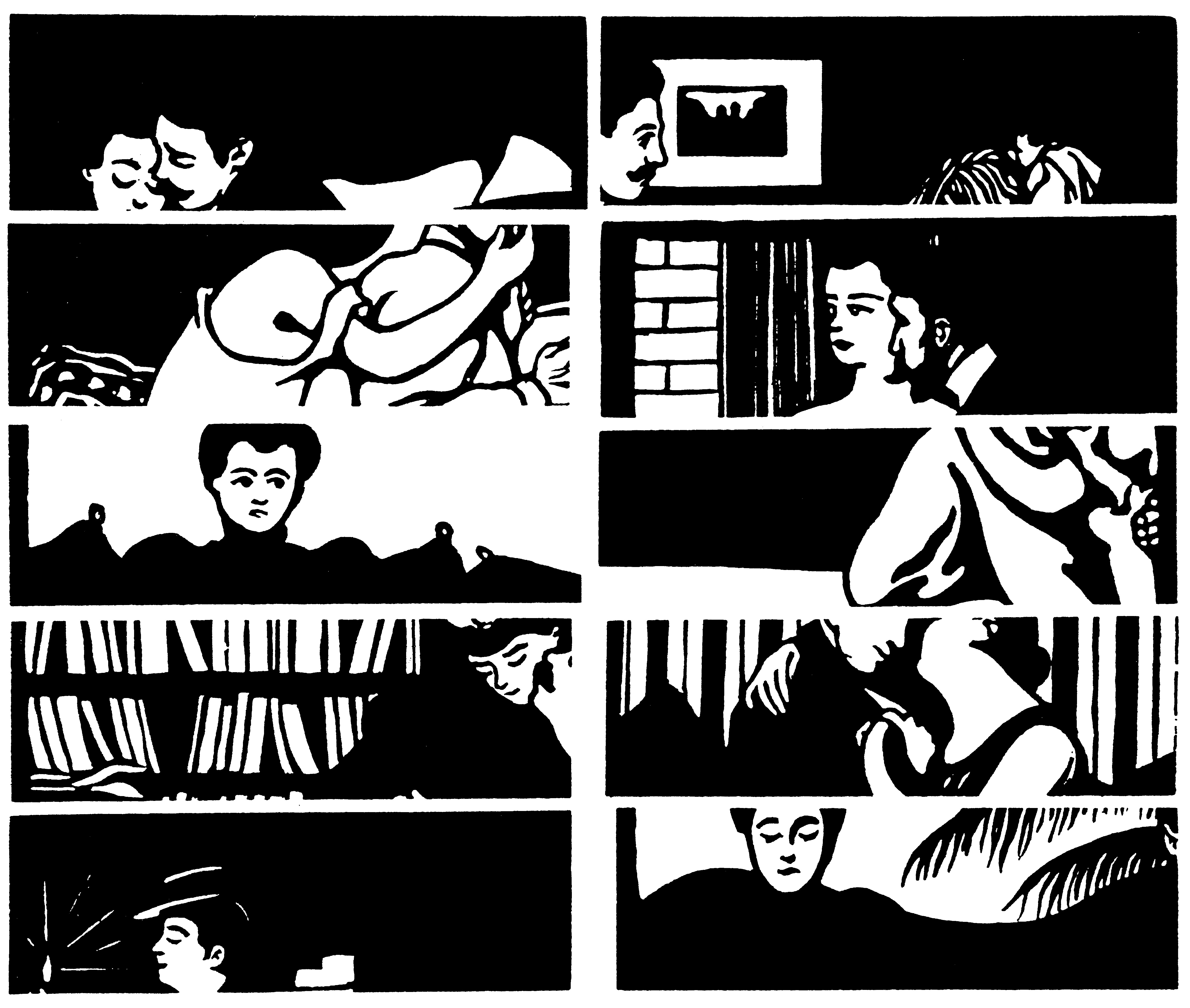 Épreuve justificative de la destruction des bois